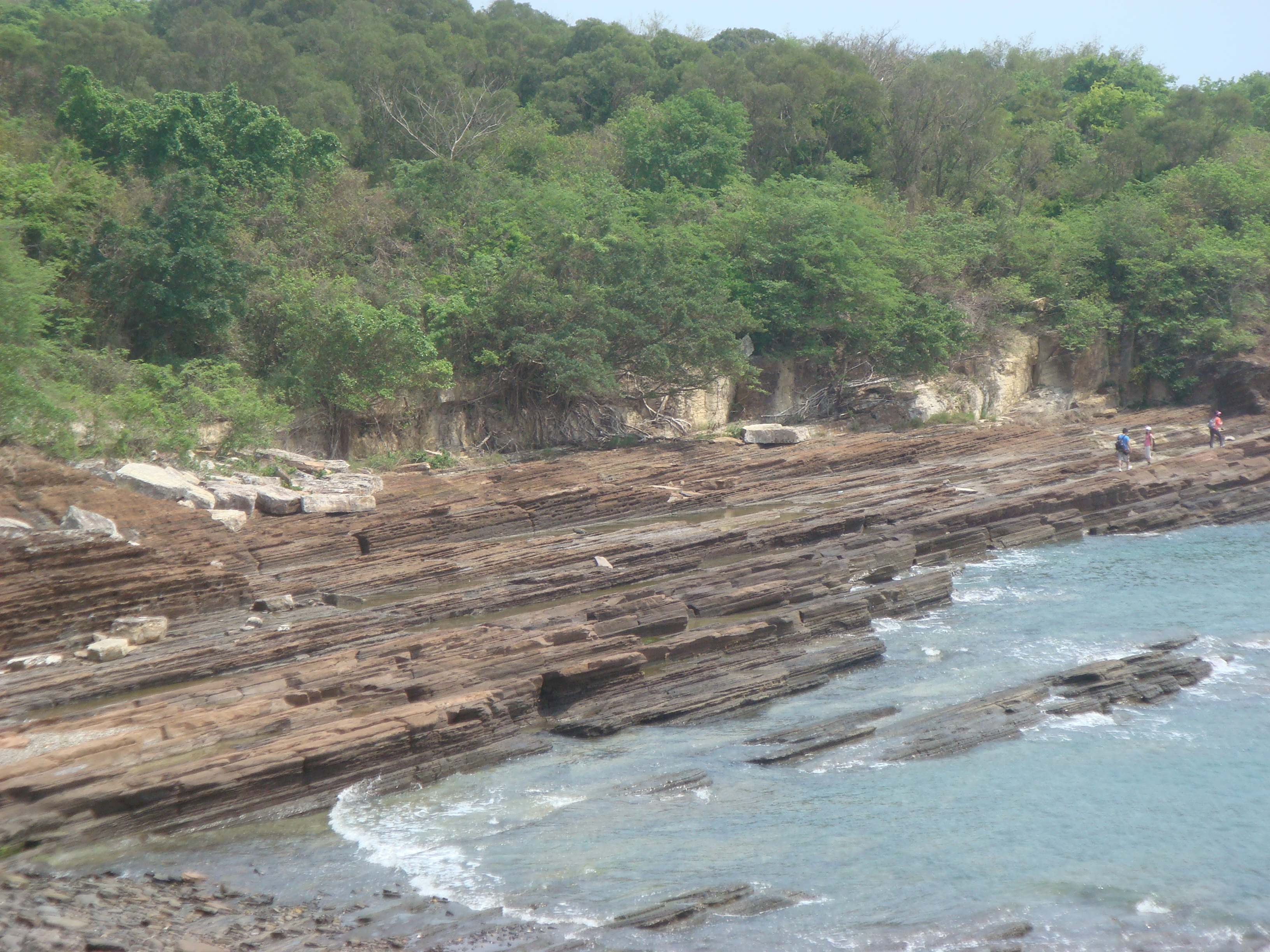 Tung Ping Chau, Hong Kong